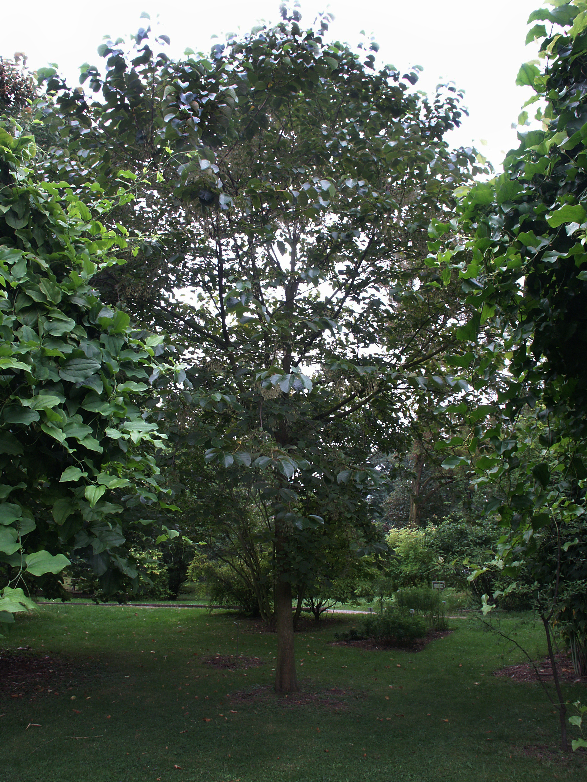 Vue générale de Pterostyrax psylophyllus - Jardin botanique de Strasbourg - France